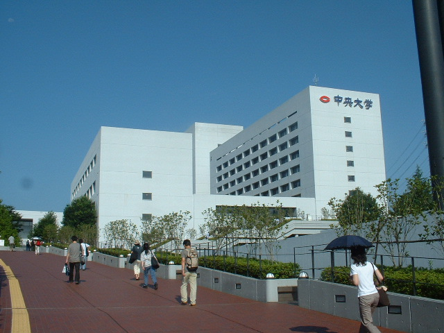 投稿者が撮影（2006/08/14）